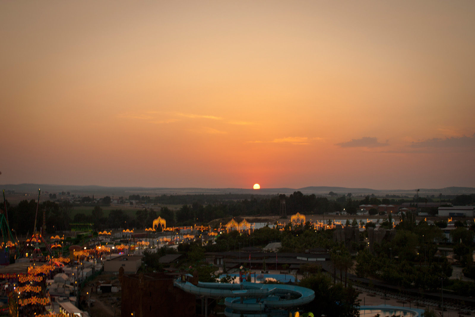 Sunset over Feria de San Juan, Badajoz